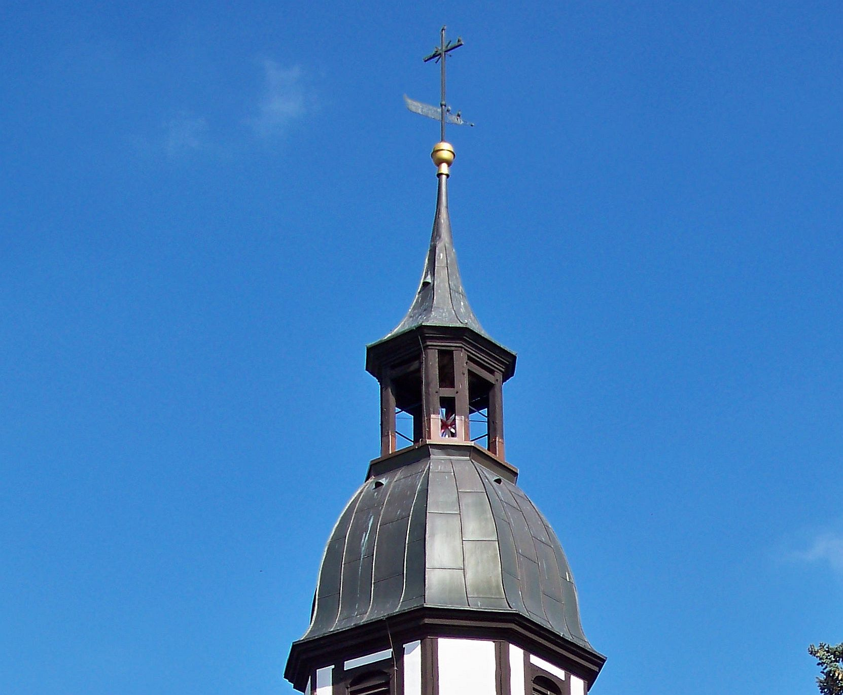 Dach des Turms der Fachwerk-Kirche in Löhsten (Herzberg/Elster)